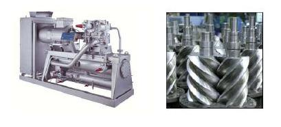 Skruekompressoren.